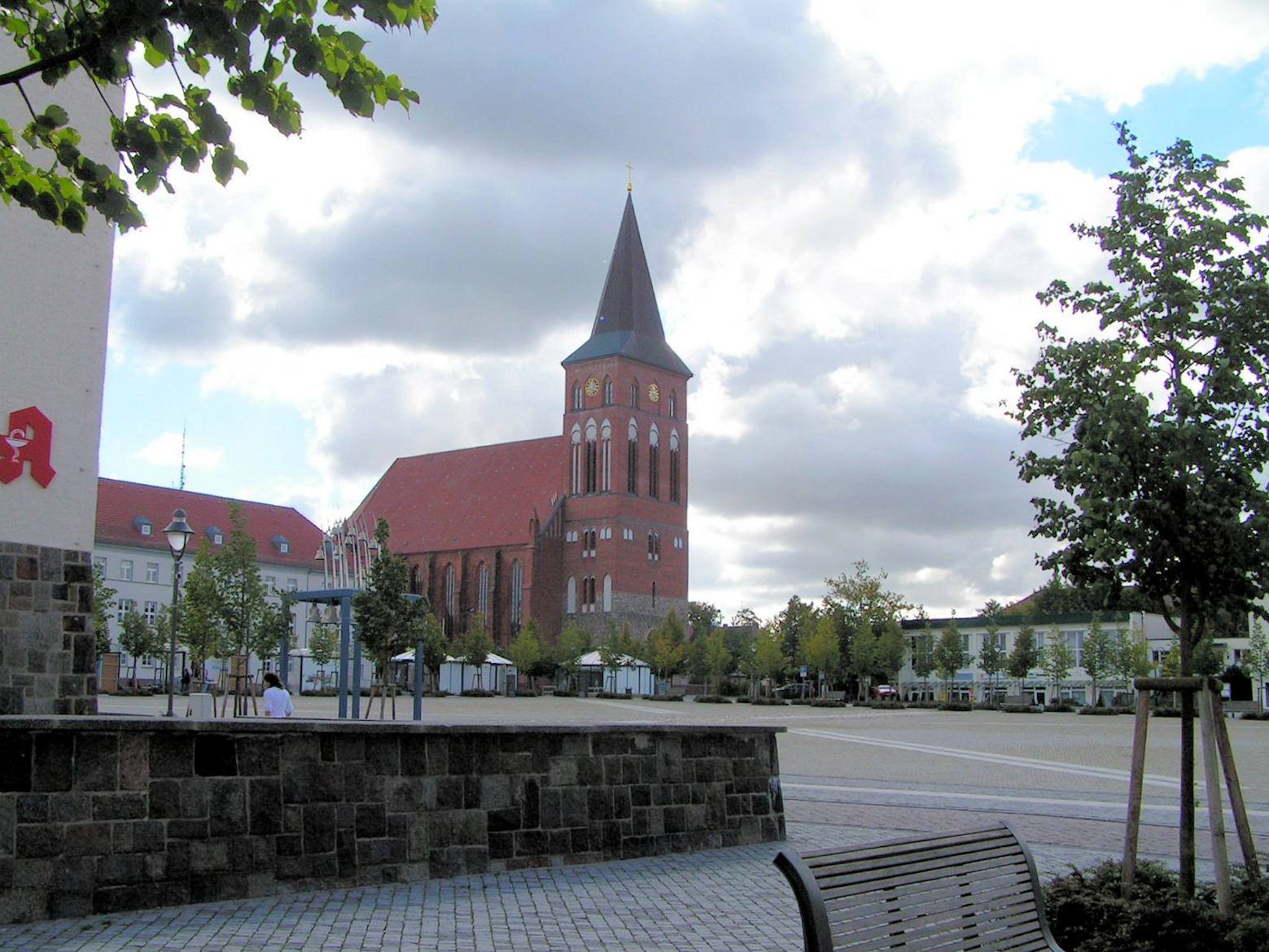 Pasewalk_Zentrum